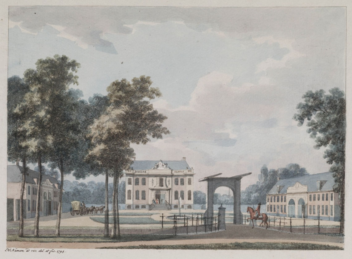 Schaffelaar bij Barneveld Het oorspronkelijke kasteel in de zg. koewei